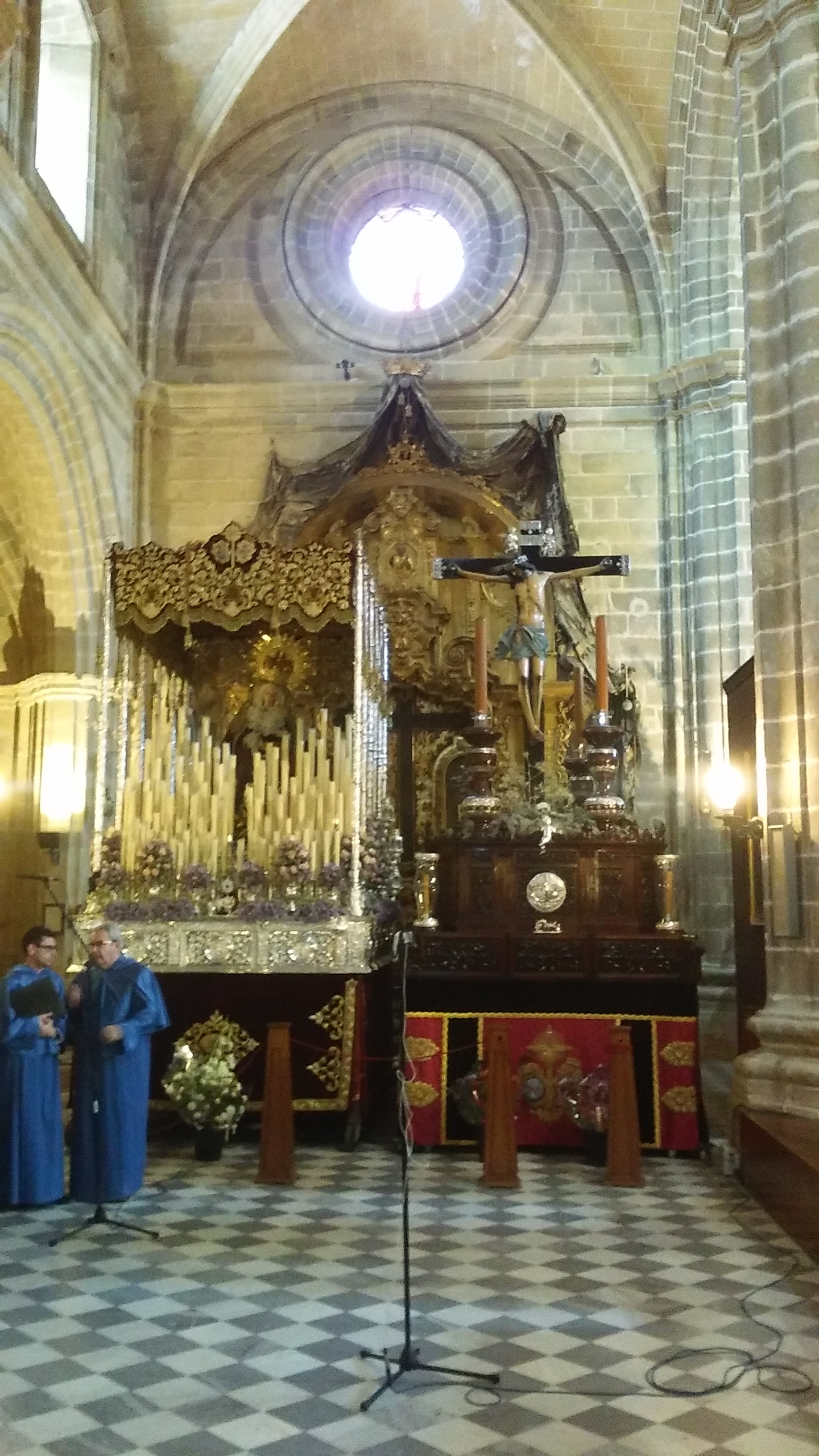 Cristo Viga Jerez